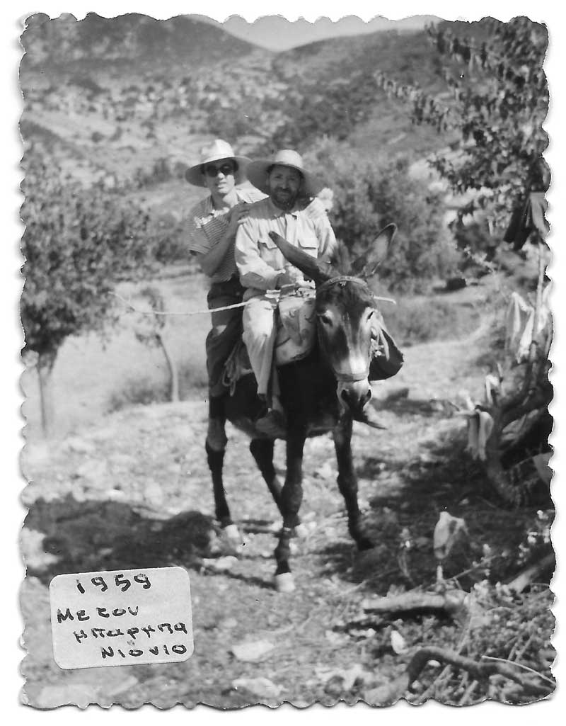 1952..Πίσω, ιστορική βρύση Σουληναρίου